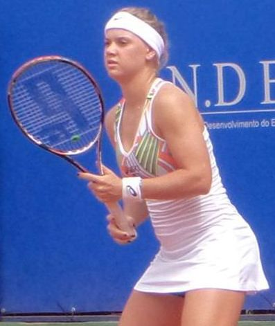 A tenista brasileira Laura Pigossi em jogo de duplas do ITF de São Paulo, em 2014, no Club Paulistano.